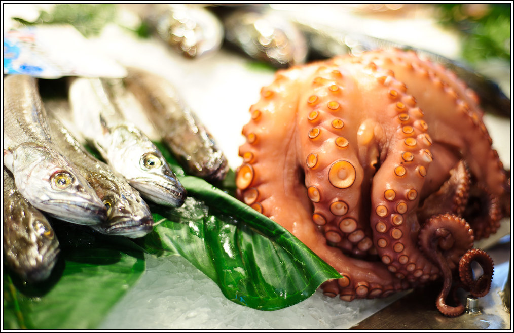 Salamanca